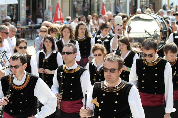 Défilé du bagad Beuzeg ar C'hab au Printemps des sonneurs rue de siam à Brest le 23 avril 2011.